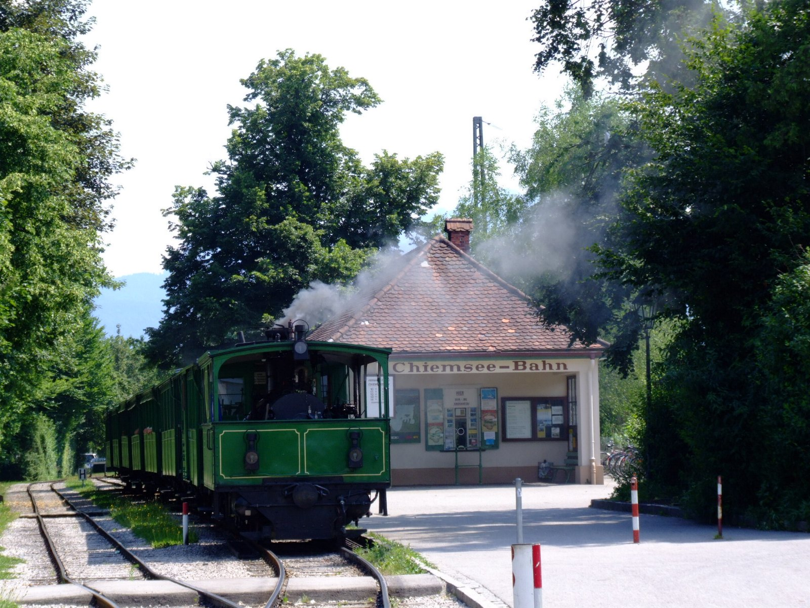 ChiemseeBahn Bhf